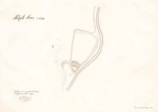 Rootsi plaan Atsele linnusest 1634 a. Näha II eeslinnuse kindlustatud vallikraaviserv, milles on ka bastionaalseid elemente. Rootsi Sõjaarhiiv.